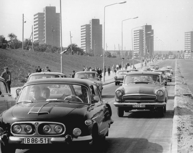 Factual corrections and alternative descriptions are encouraged separately from the original description. Additionally errors can be reported at this page to inform the Bundesarchiv. Original historic description: Rostock, Neue Verkehrsstaße Zentralbild Sindermann 5.7.1969-ge- Rostock: Neue Verkehrstraßen übergeben. Grünes Licht für neue Straßen hieß es am 5.9.69 in der Werft- und Hafenstadt , als am Vorabend der Ostseewoche u.a. ein weiterer Abschnitt der Nord-Süd-Magistrale eingeweiht wurde. Sofort nach der Übergabe setzte reger Verkehr ein.